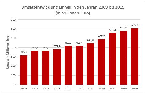 Umsatzentwicklung des Einhell Konzerns von 2009 bis 2019